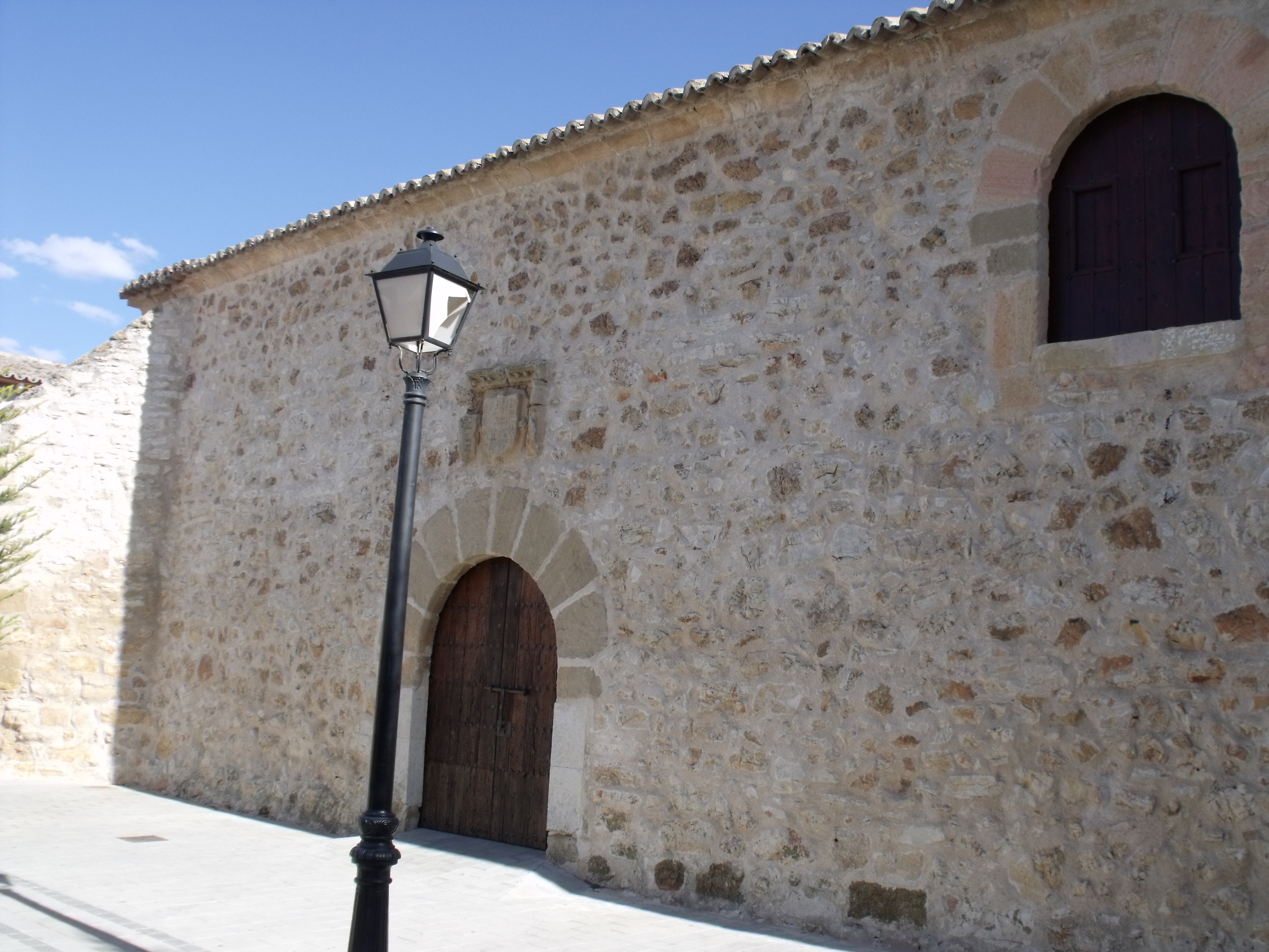 Tercia Mota del Cuervo (Cuenca).